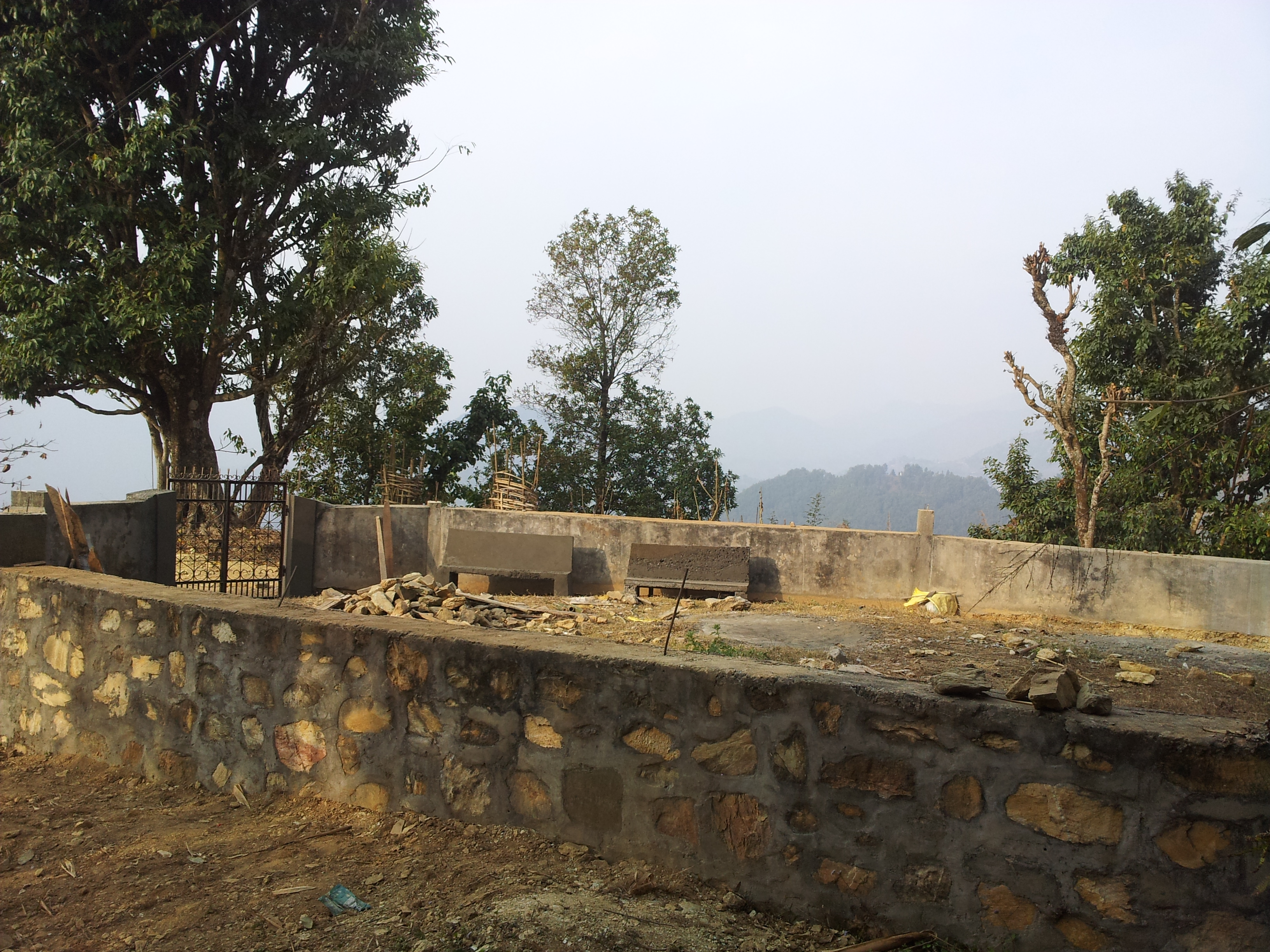 नेपाली: गोकुल पार्क